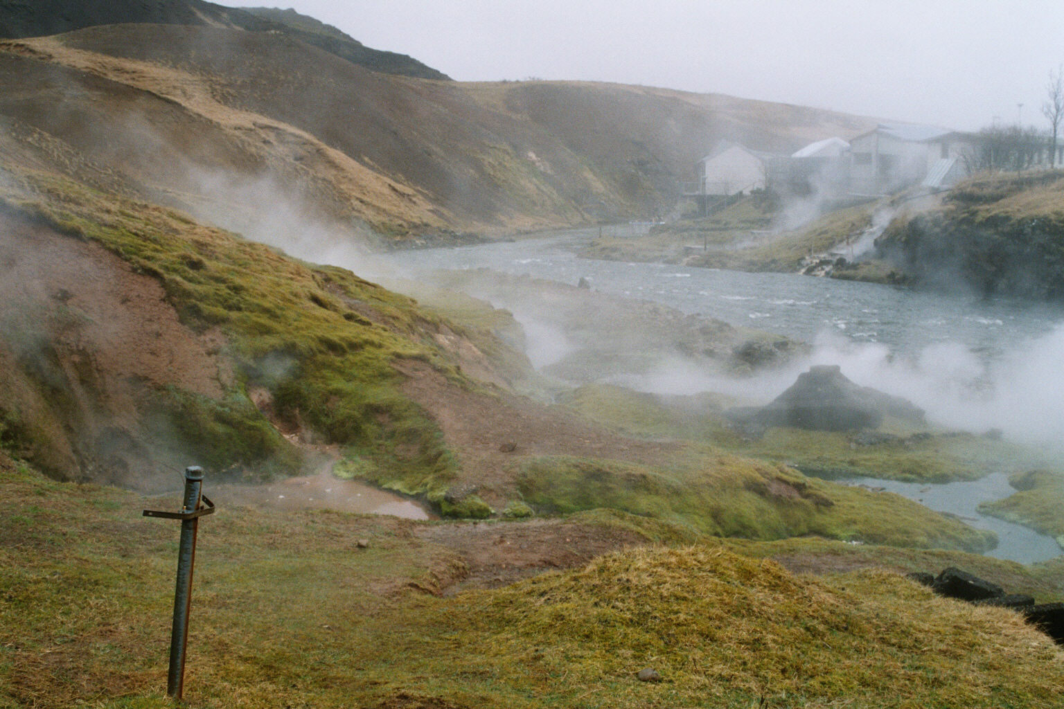 Hveragerdi, Island, GNU-FDL Das Bild wurde von mir selbst im April 2004 gemacht und verstößt gegen kein Copyright. Reykholt 19:39, 20. Mai 2004 (CEST)